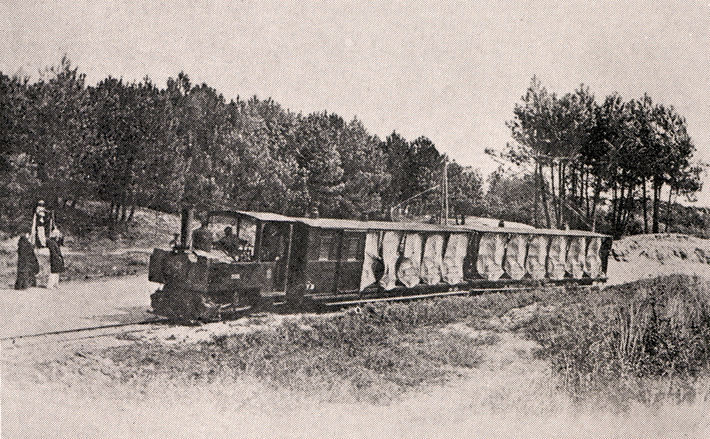 Tramway de Quend - Fort-Mahon - La courbe des Sapins